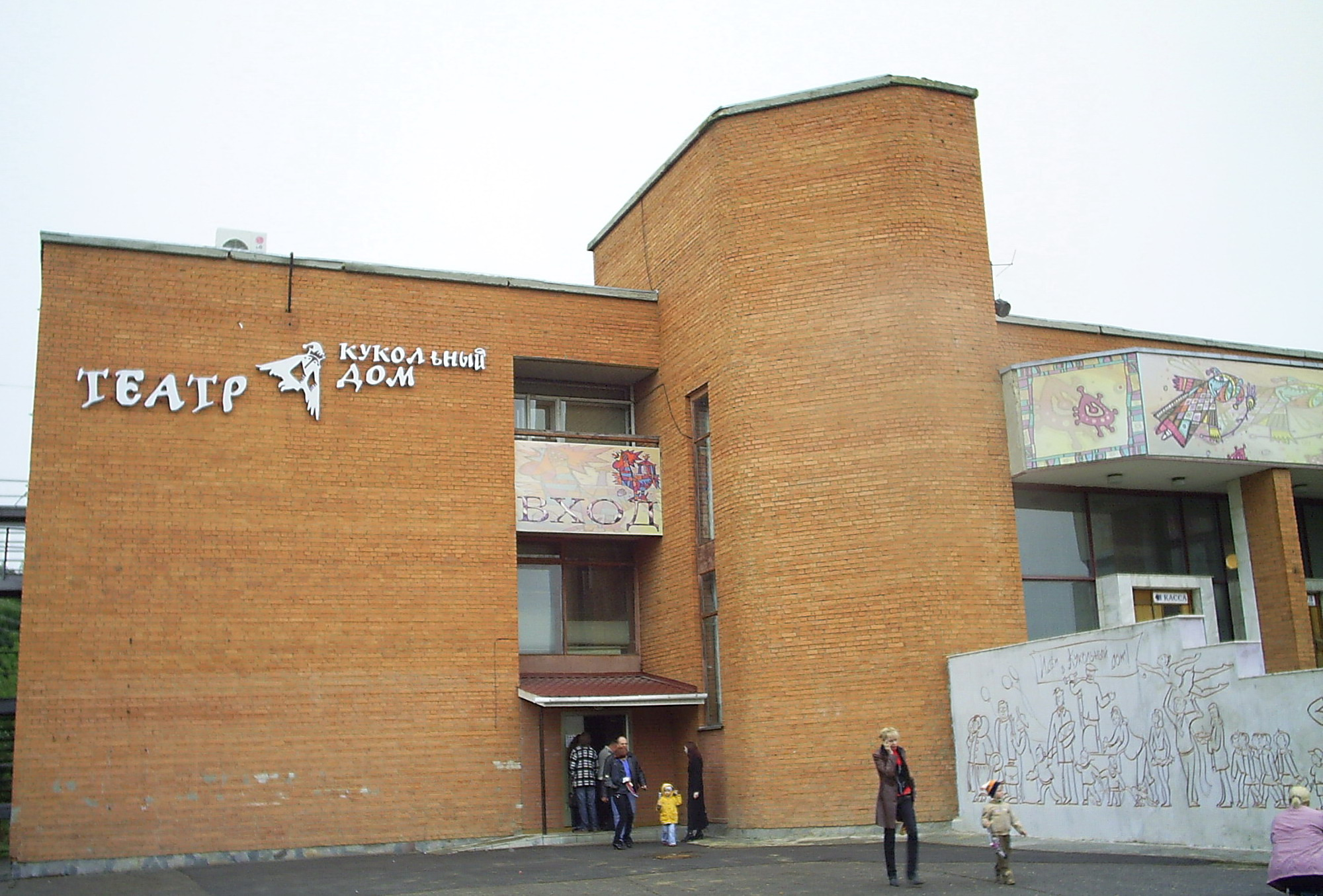 Пензенский областной театр кукол «Кукольный дом»